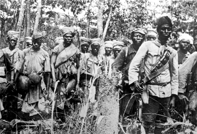 Deutsch-Ost-Afrika, Askaris und Träger Schutztruppe Deutsch-Ost-Afrika Askaris und Träger auf dem Marsch